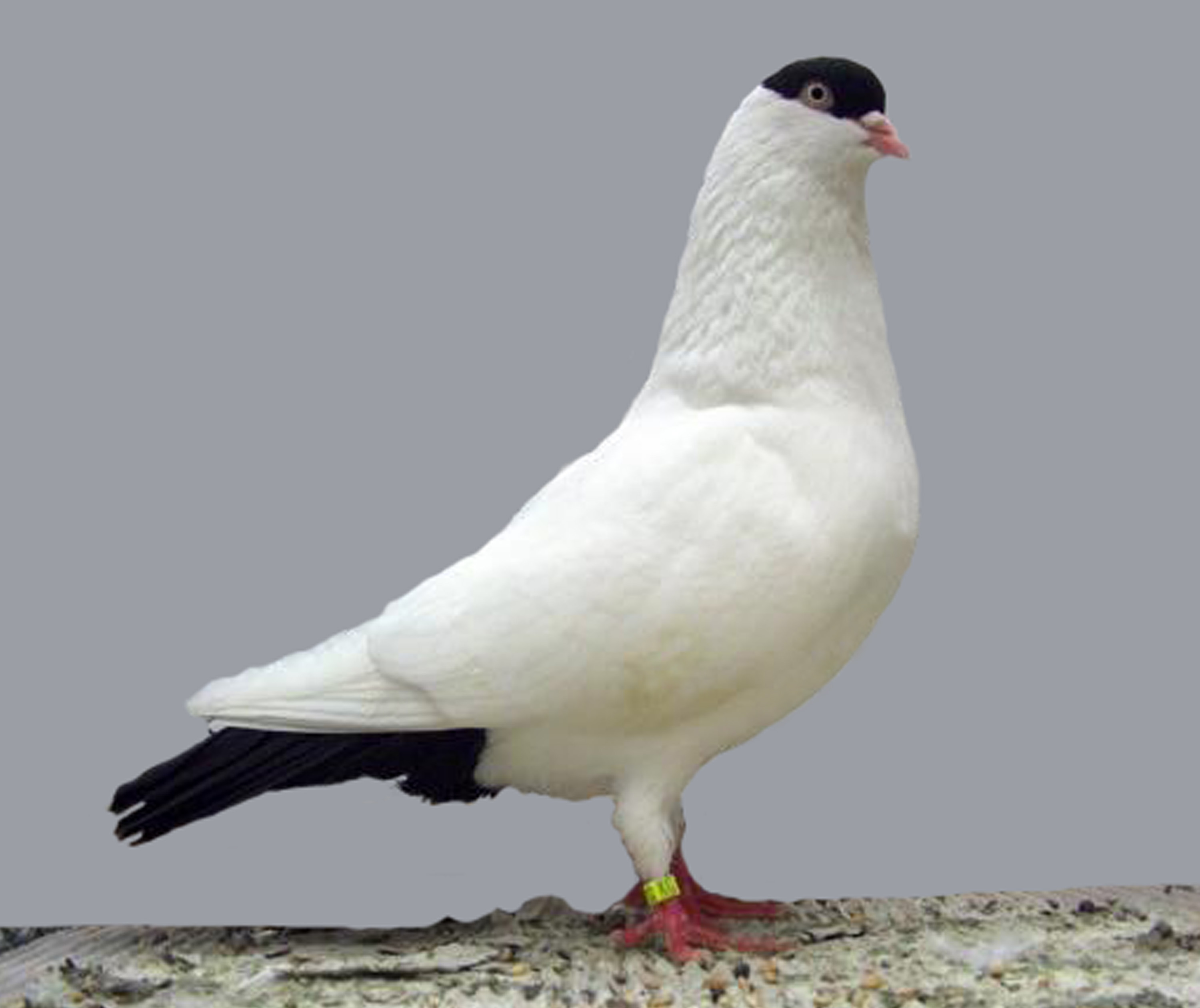 Cologne Tumbler (Black Helmet-Marked)